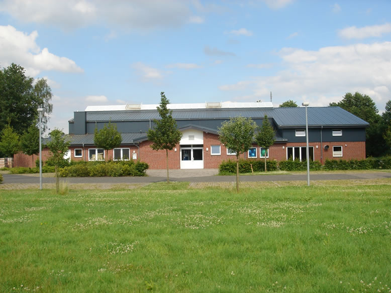 Westfront der Bentfelder Sporthalle.